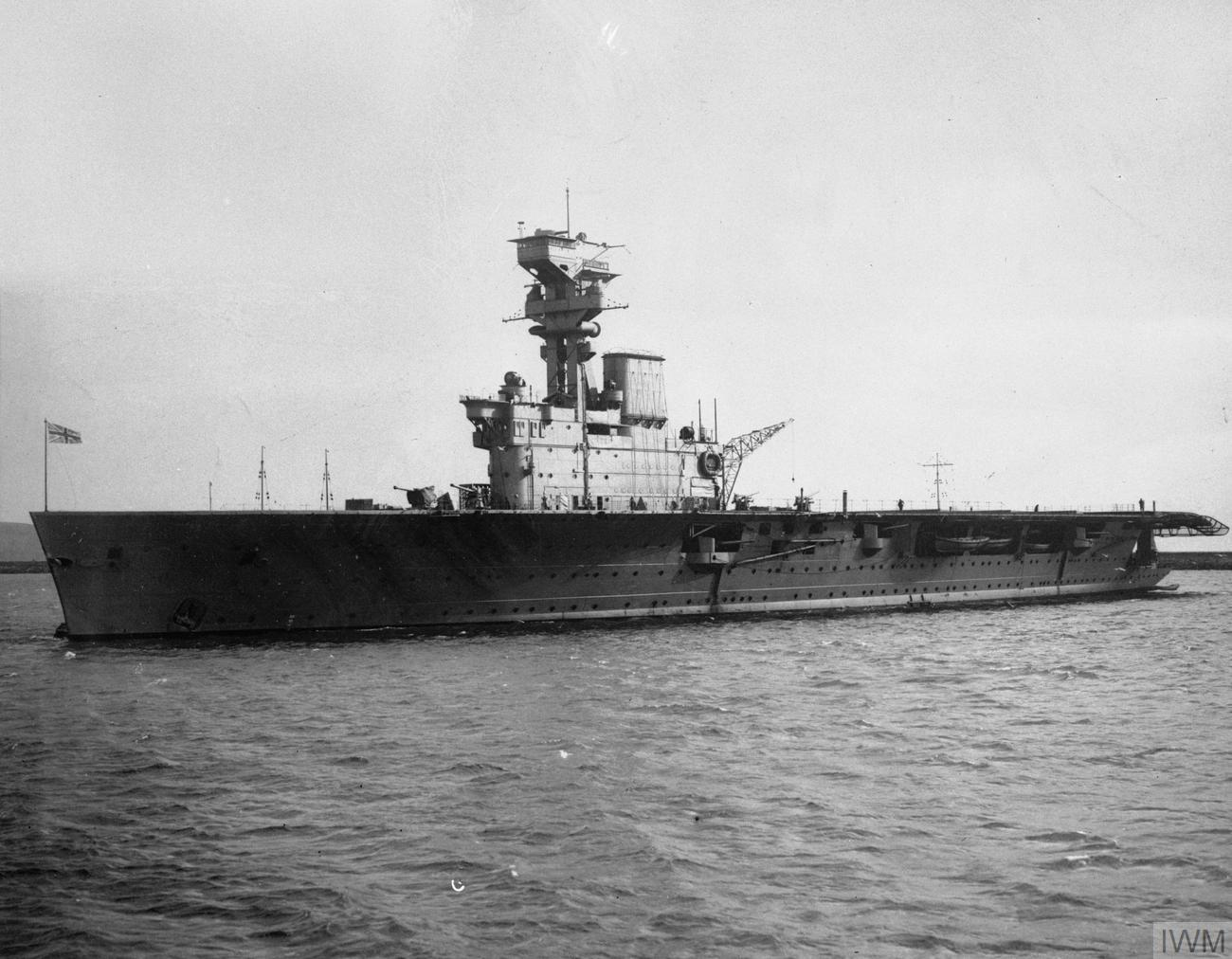 HMS Hermes